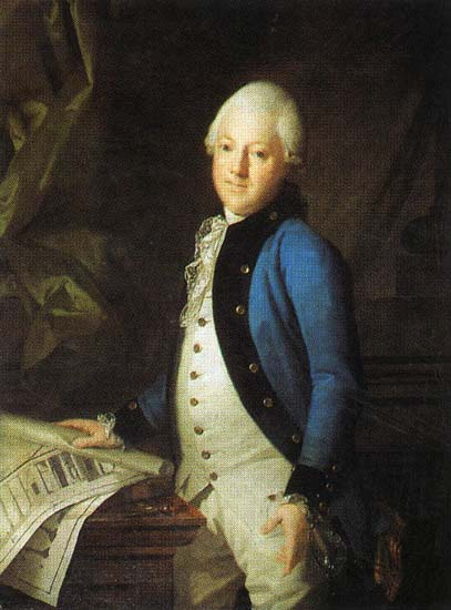 Фельтен Юрий Матвеевич (Georg Friedrich Veldten). Русский музей. Ю.М. Фельтен одет в дворянский мундир Санкт-Петербургской губернии.